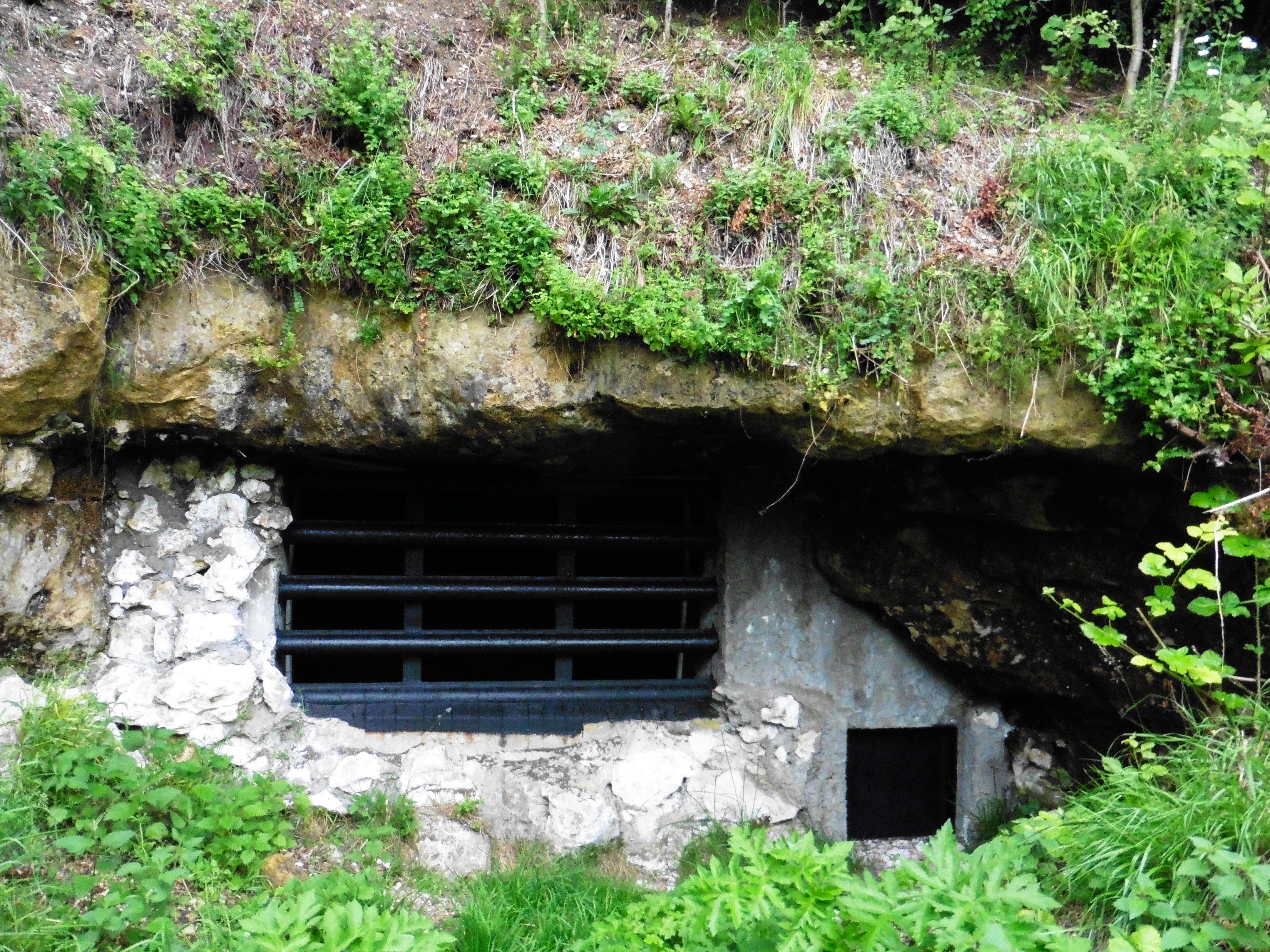 Grotte d'Acquin, nichoir à Chiroptères, dans l' Audomarois.- Pas-de-Calais